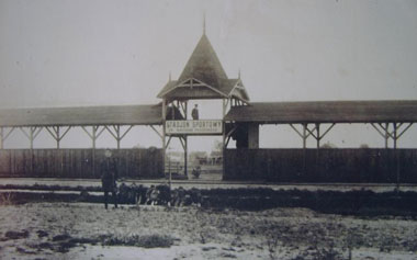 Drewniana trybuna Stadionu Sportowego im. Marszałka Piłsudskiego, wybudowana przy ul. Legionów w 1929r., za kadencji Burmistrza Jana Kulisiewicza.